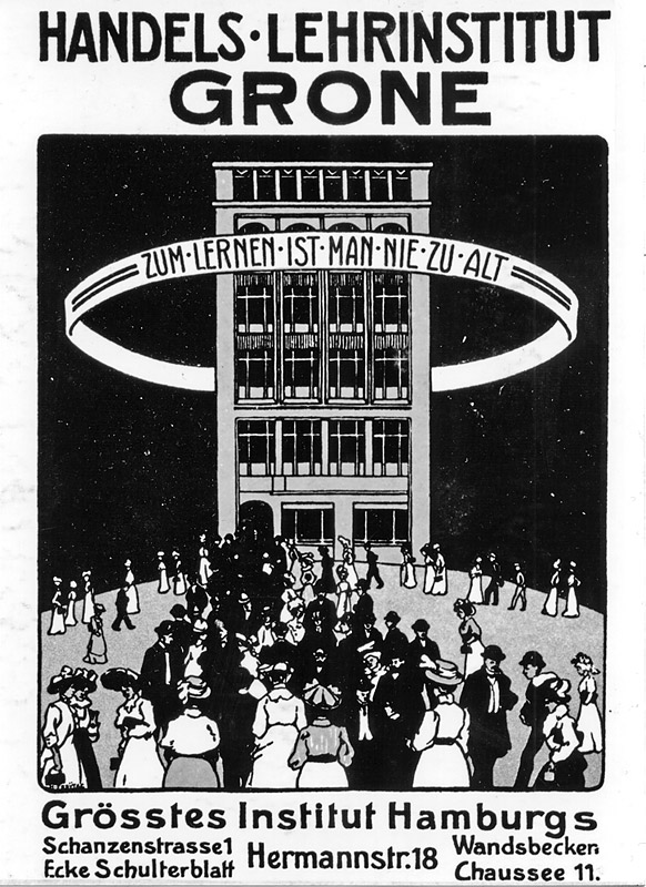 Plakat aus der Anfangszeit der Grone-Schulen